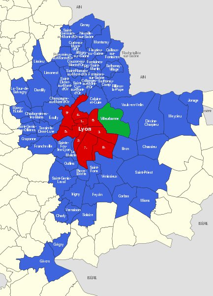 Carte de la communauté urbaine du Grand Lyon, Villeurbanne en vert